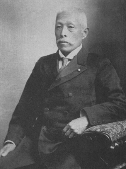 中御門経隆男爵